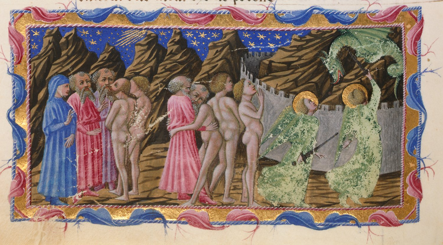 Priamo dell quercia, purgatorio 03 dante, virgilio e sordello.jpg